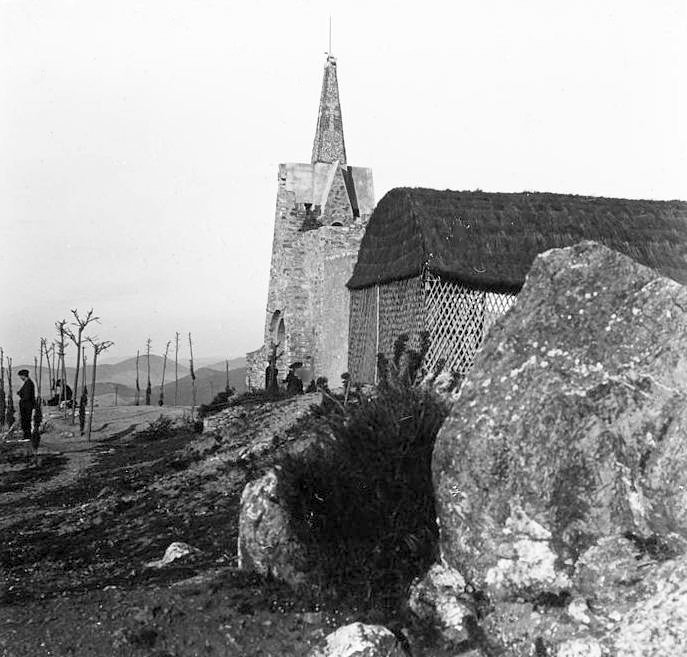 Capelleta a Montcada i Reixac. Josep Salvany i Blanch (1913)